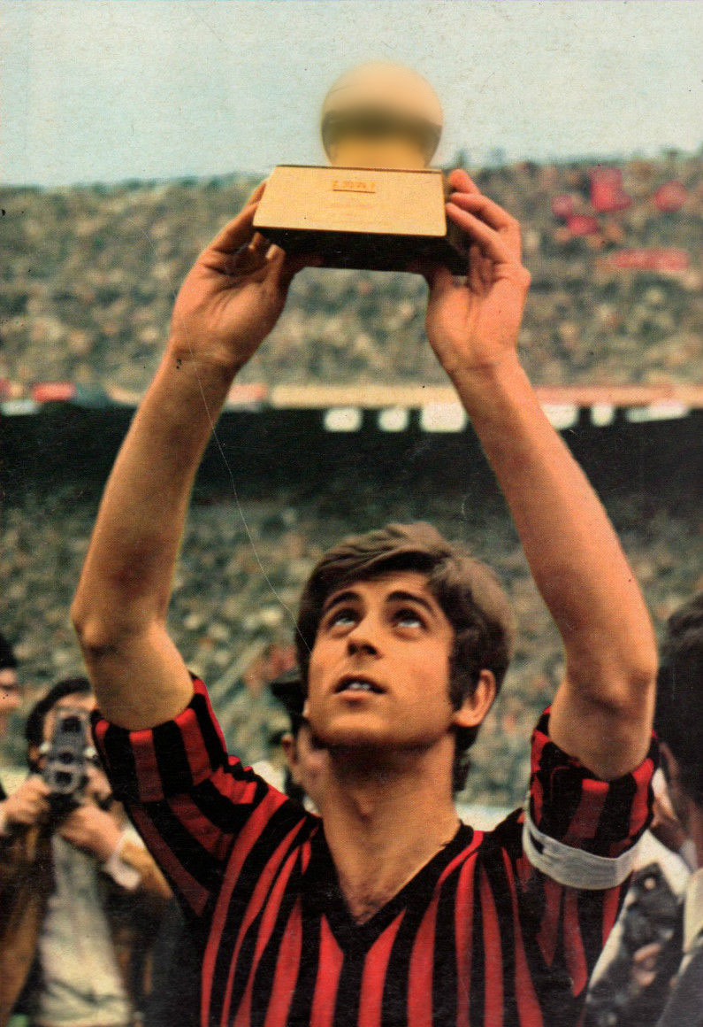 Milano, stadio San Siro, 19 aprile 1970. Gianni Rivera, capitano del Milan, solleva il Pallone d'oro di France Football vinto nel 1969 quale miglior giocatore europeo; Rivera fu il primo calciatore italiano a ricevere tale riconoscimento – escludendo l'italo-argentino Omar Sívori, insignito del premio nel 1961 grazie al suo status di oriundo.